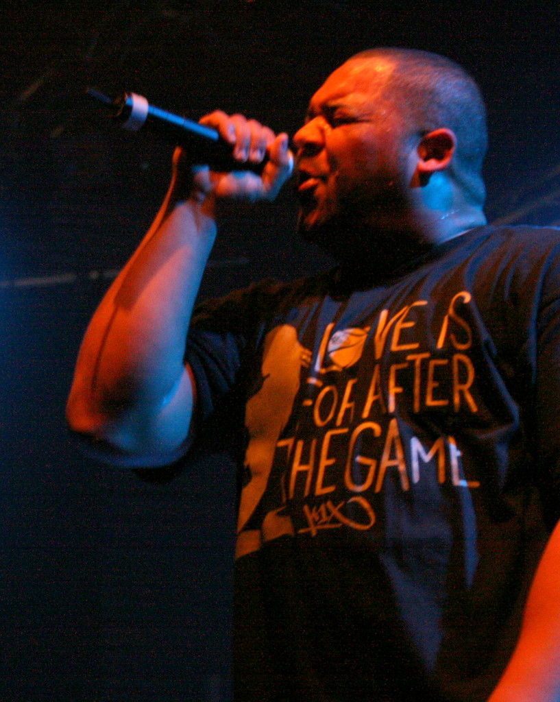 Joell Ortiz performing in Amager Bio, Denmark.